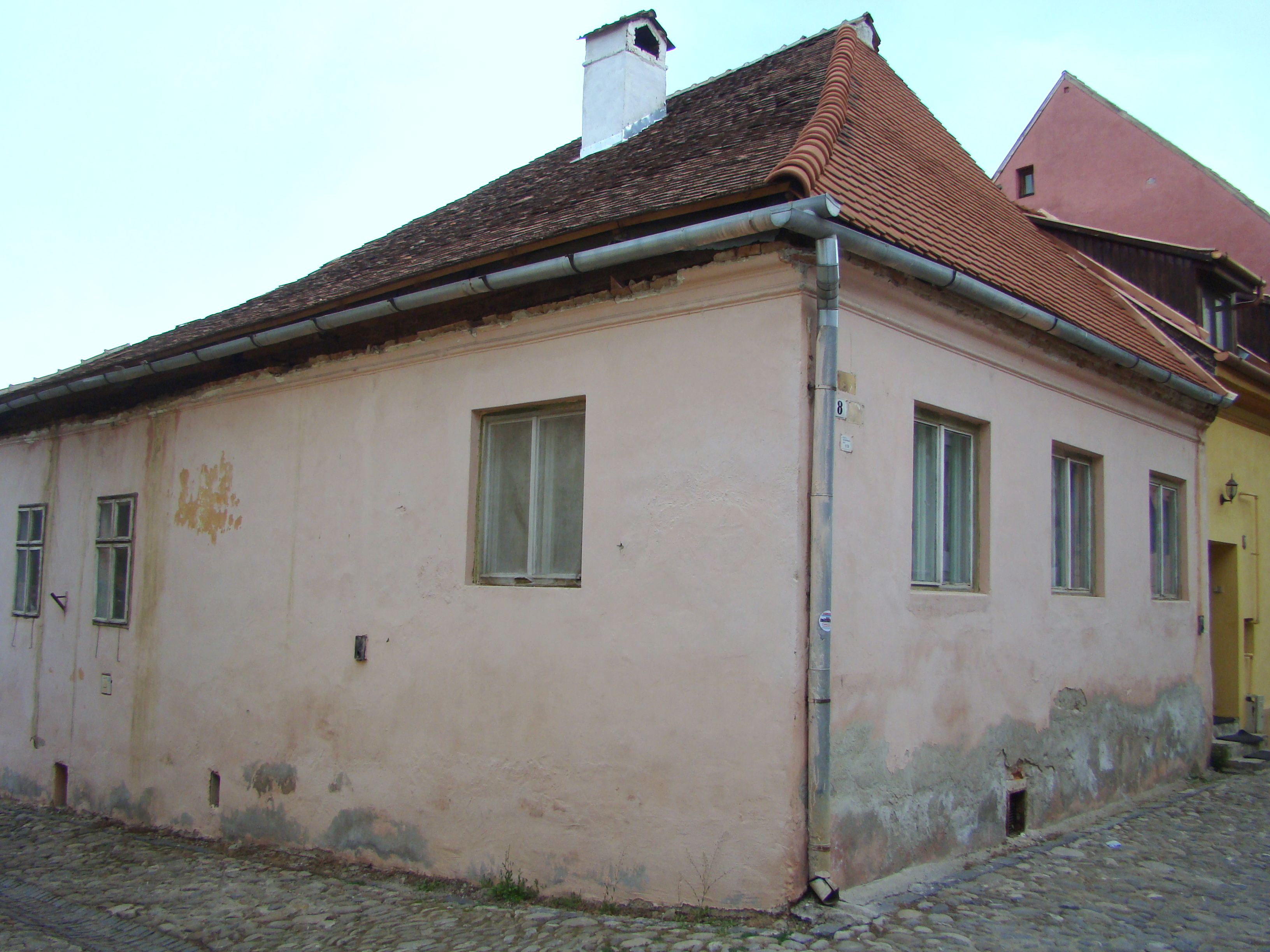 Casa Lighner, municipiul Sighișoara, str. Tâmplarilor 8 1750 - 1800, sec. XX